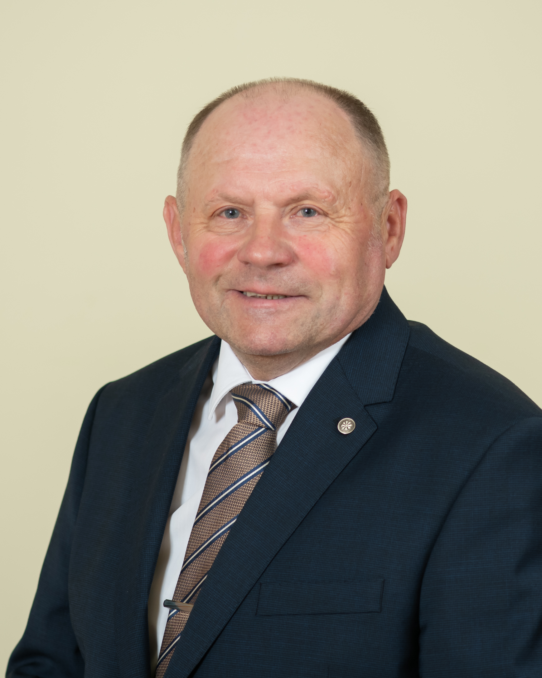 Tiit Kala